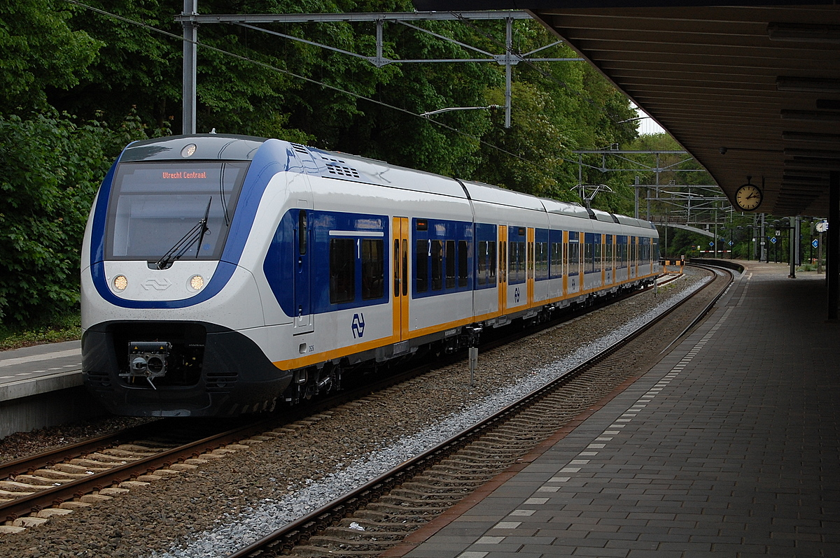 NSR 2626,te Baarn.